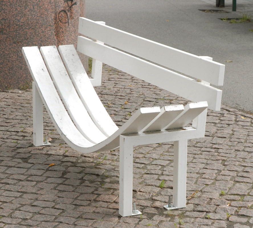 "Modified Social Benches, 2005 Acier galvanisé et traité courtesy of Johan König, Berlin and "303 gallery", NY. Jeppe Hein (1974-), Danemark Le Kiasma est le grand musée d'art contemporain d'Helsinki. La bâtiment a été conçu par l'architecte américain : Steven Holl qui a réussi son intégration en plein coeur de la ville. L'établissement a été inauguré en mai 1998 et fête son 10 ème anniversaire par des expositions et manifestations exceptionnelles. Le Kiasma possède des collections permanentes mais se définit comme un carrefour de toutes les formes d'expression artistique. Chaque année en août, se déroule le festival URB concernant les cultures urbaines (skate, techno, rap, hip hop,..)